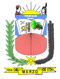 Escudo del municipio Turén. Estado Portuguesa. Venezuela